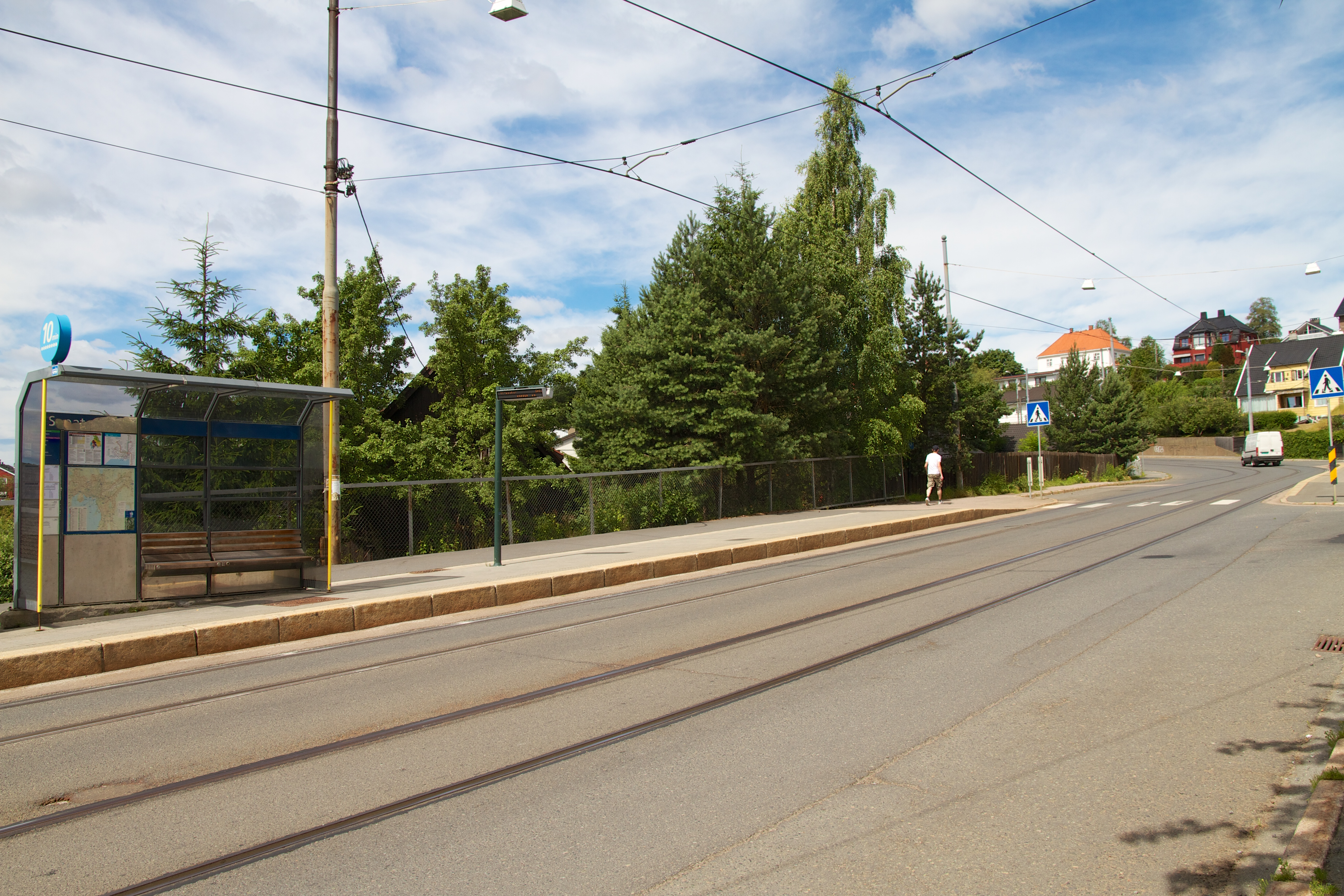 Sanatoriet holdeplass